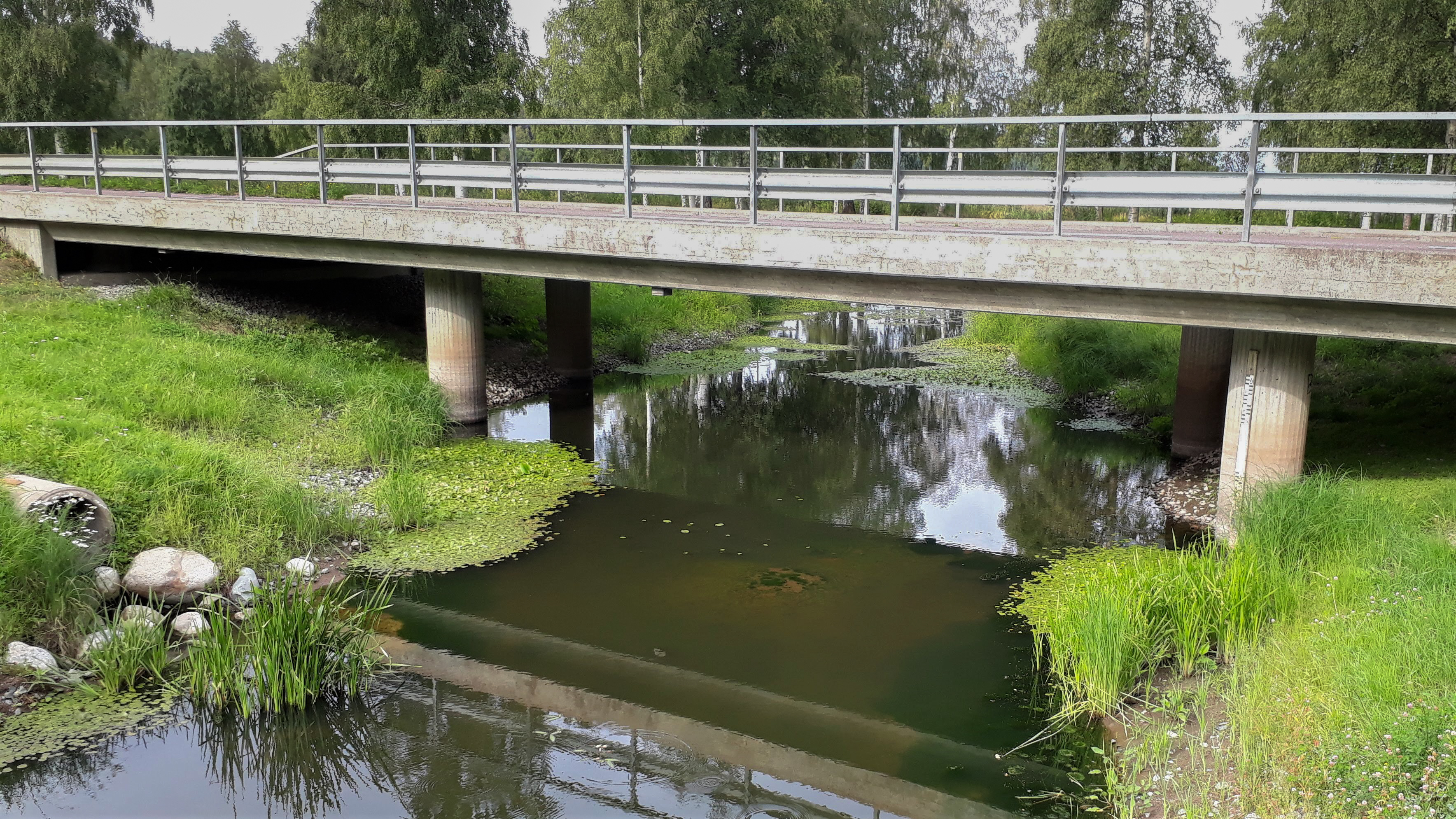 Broån, Hedemora, Dalarnas län, Sverige